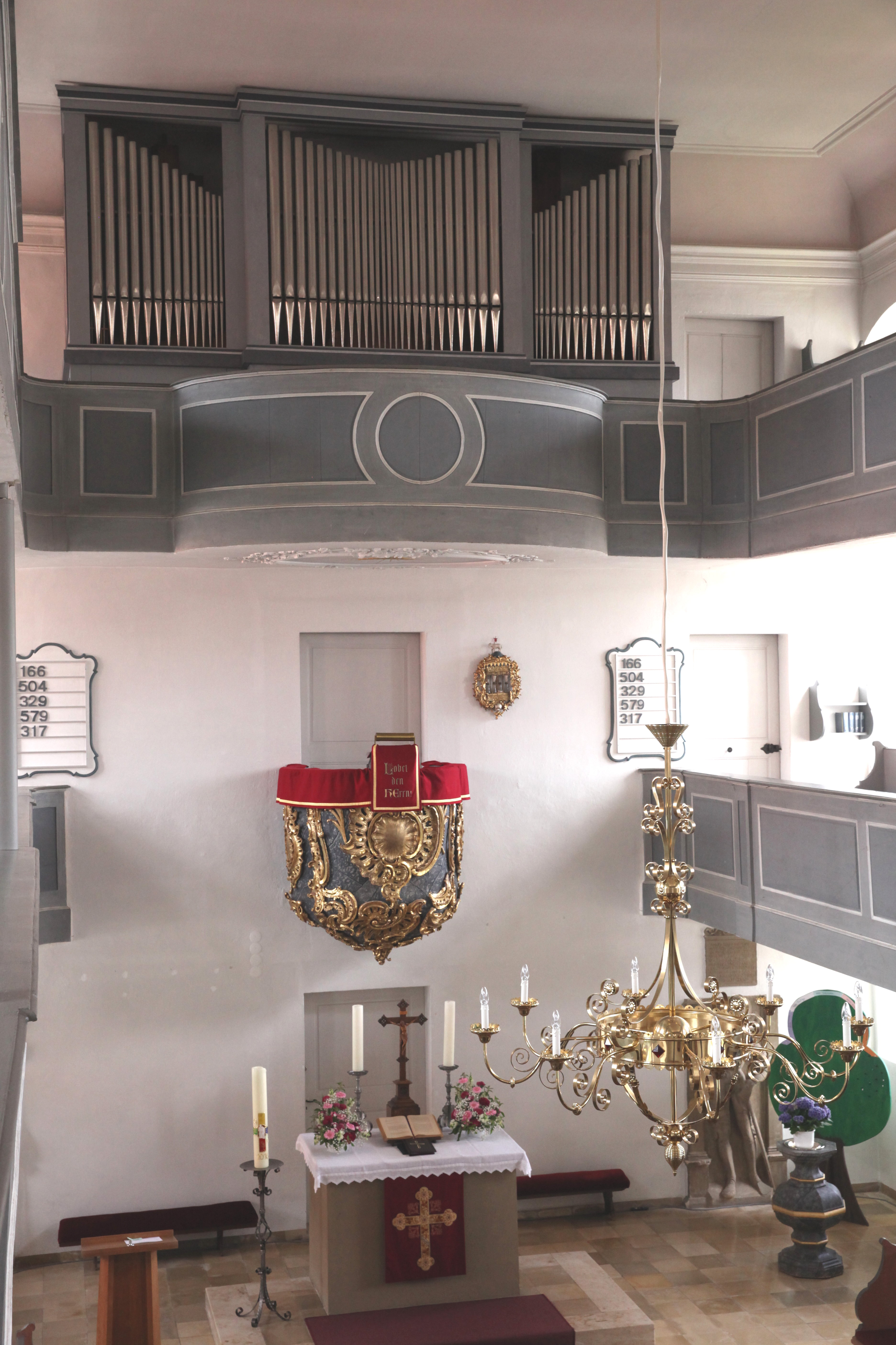 Kanzelaltar mit Orgel, Pfarrkirche in Heilgersdorf